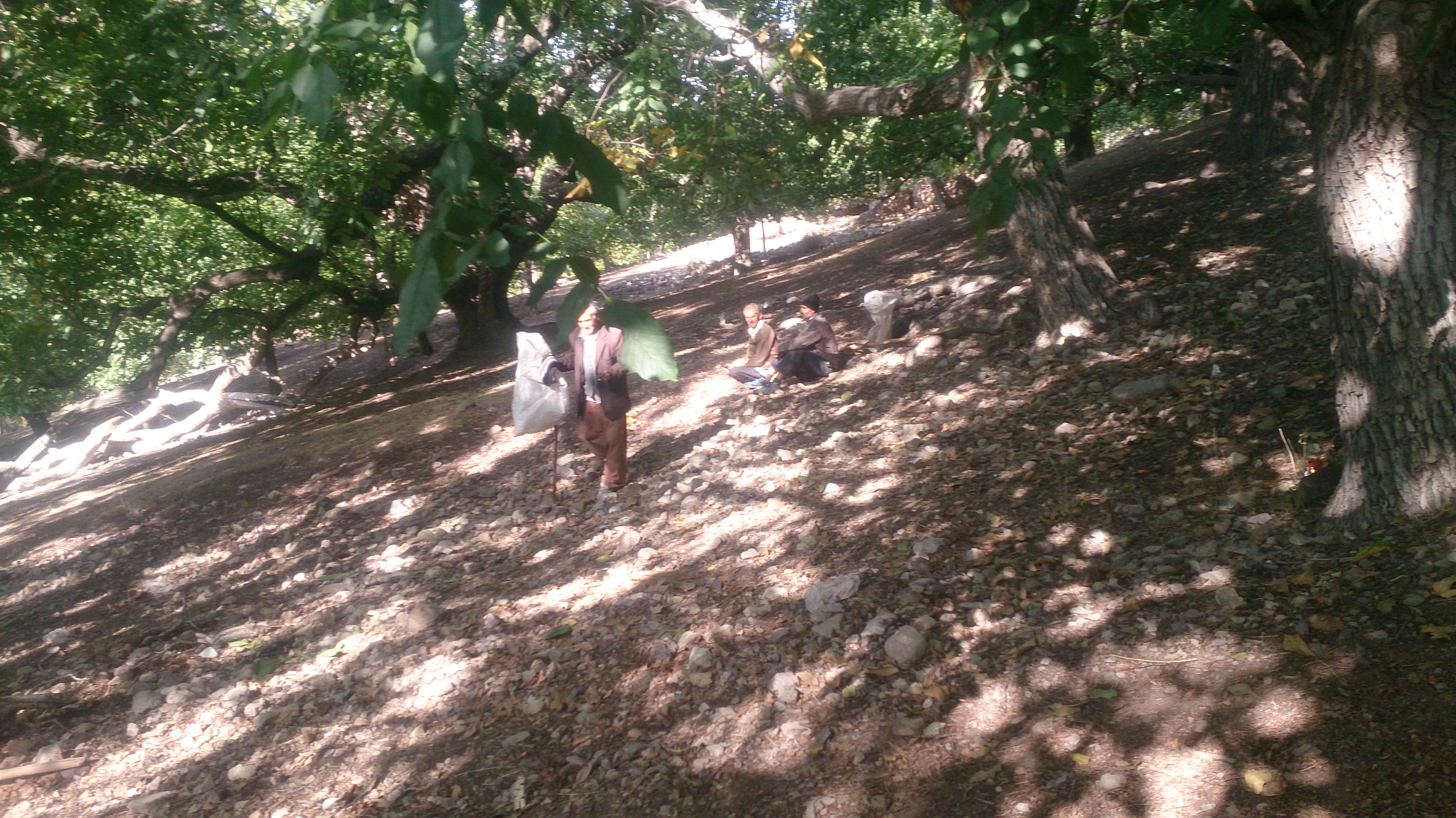 برداشت گردو (گردو تکانی) در روستای دامنه